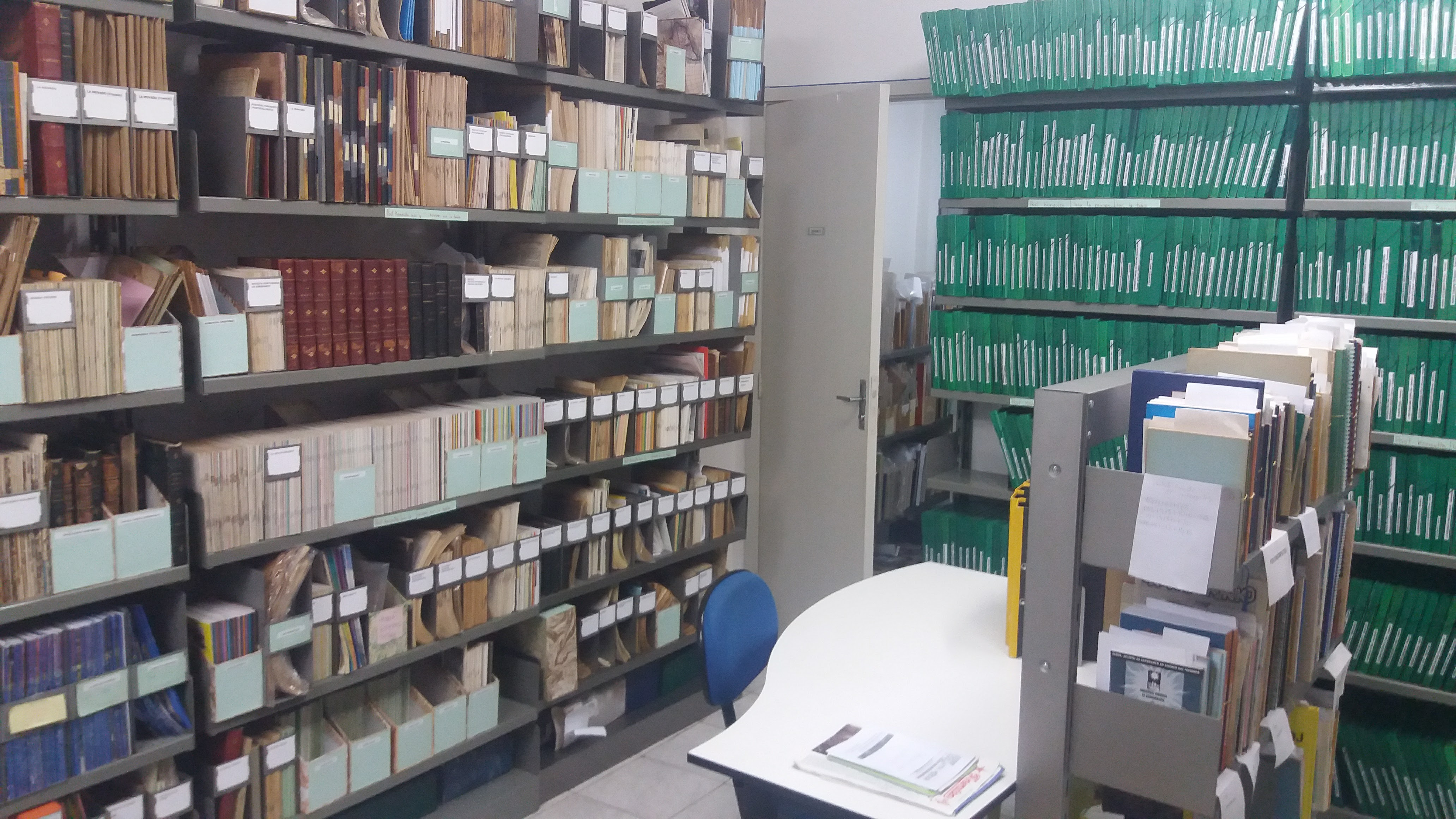 Interno de Biblioteko Carlos Domingues ĉe la sidejo de Brazila Esperanto-Ligo